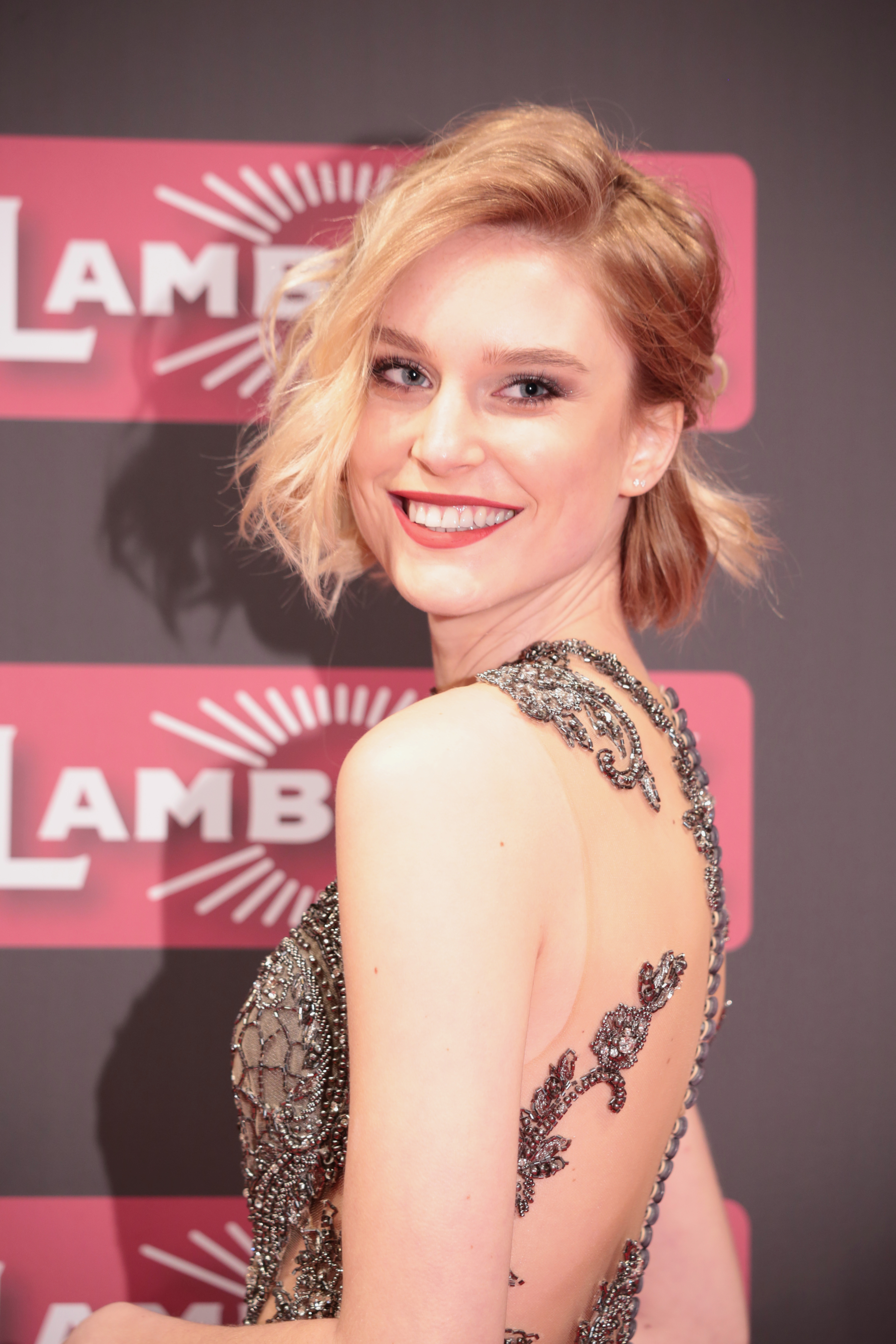 Kim Hnizdo bei der Lambertz Monday Night 2018.